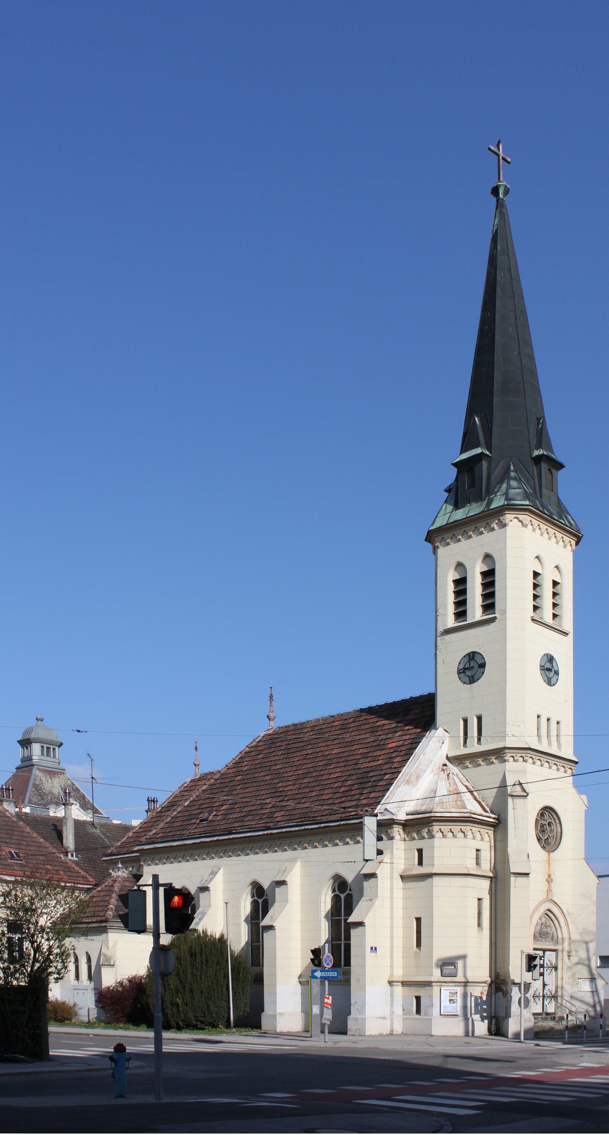 Evangelische Pfarrkirche St. Pölten